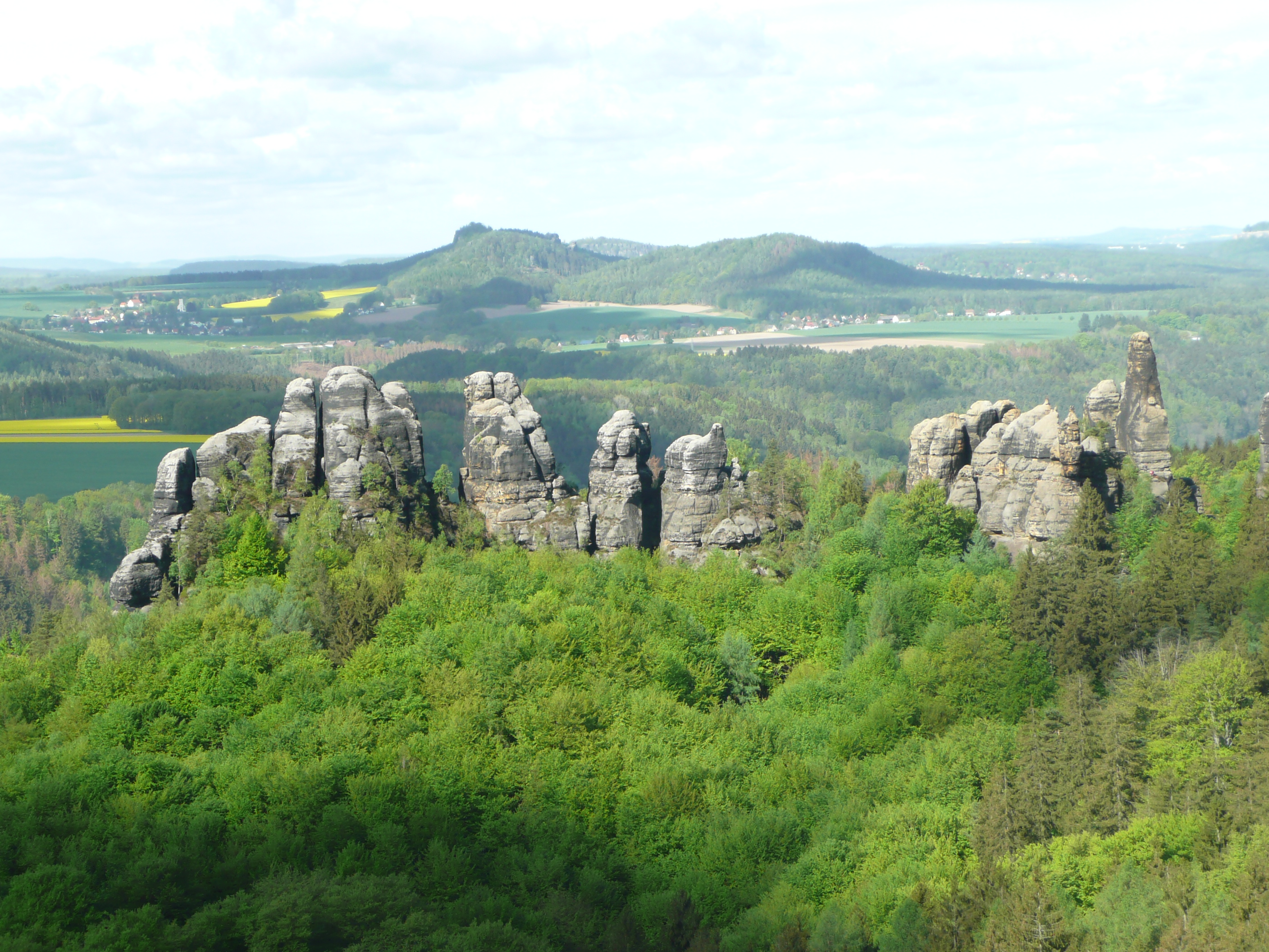 Vordere Torsteinkette im Schrammsteingebiet und Gebiet der Steine im NSG Sächsische Schweiz